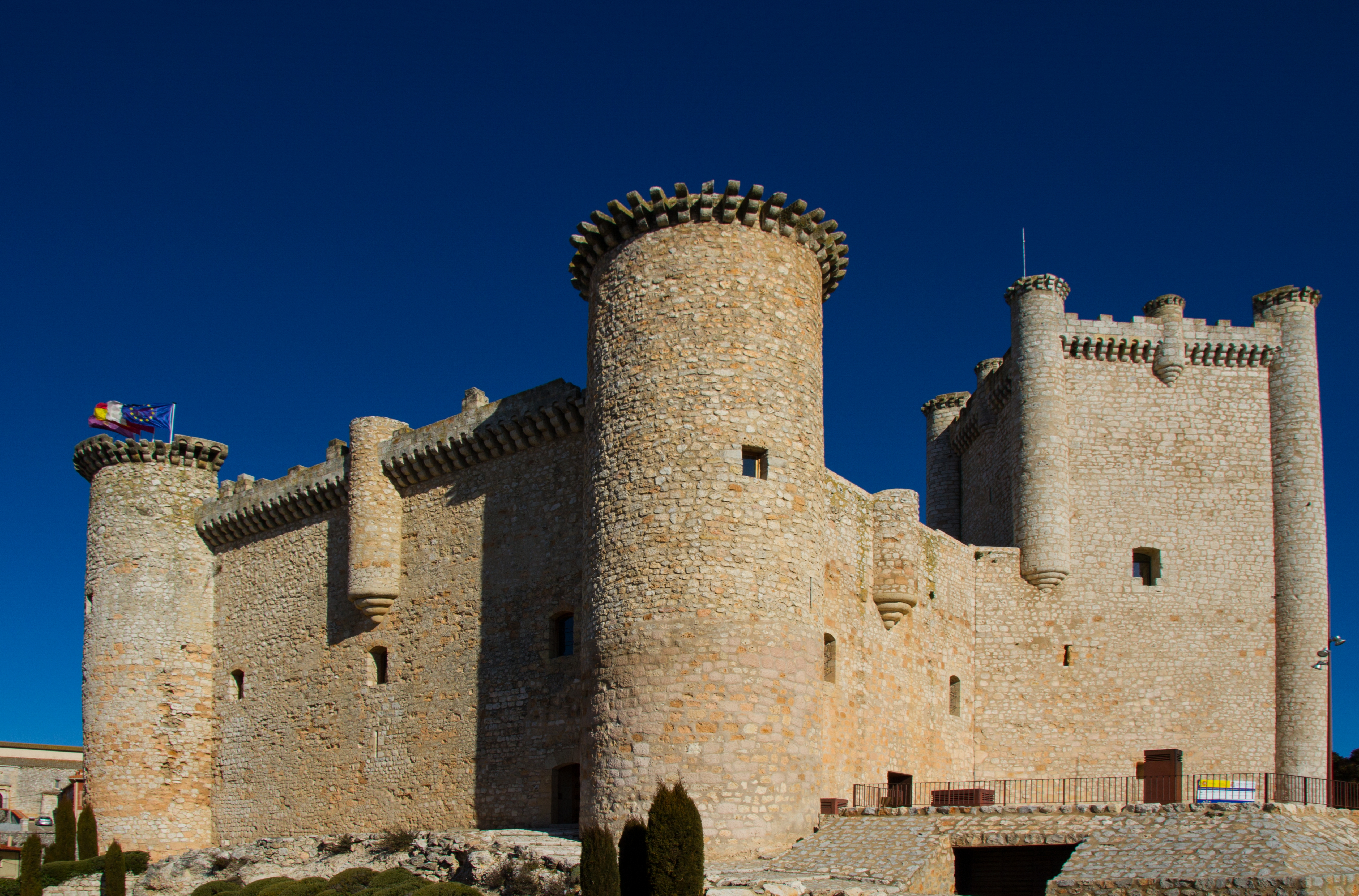 Torija, provincia de Guadalajara, Castilla-La Mancha, España.